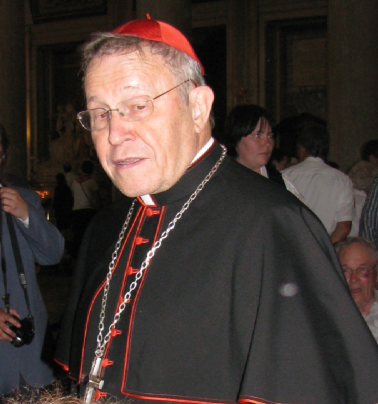 Walter Kardinal Kasper nach einer Messe in Santa Maria Maggiore.Auszug aus einem Foto von Johannes Joas